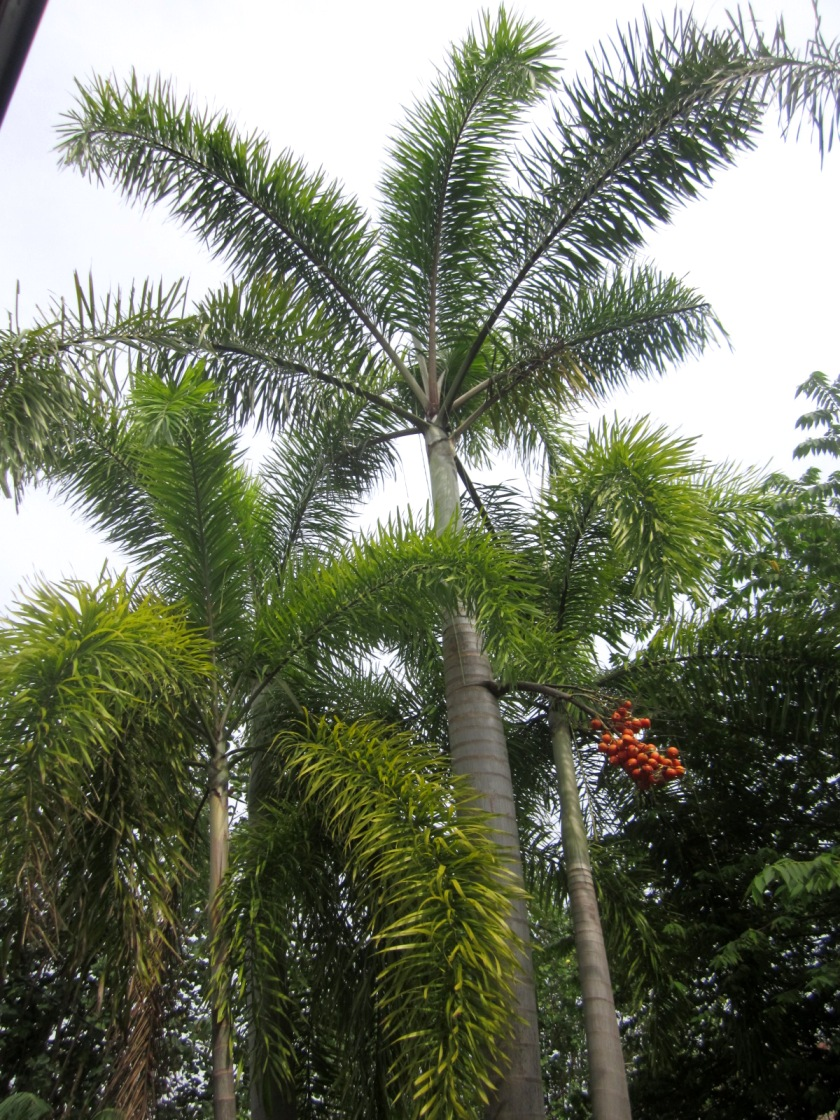 Palem ekor tupai (Wodyetia bifurcata) sebagai penghias taman. Tampak kumpulan buah pada salah satu pokok.